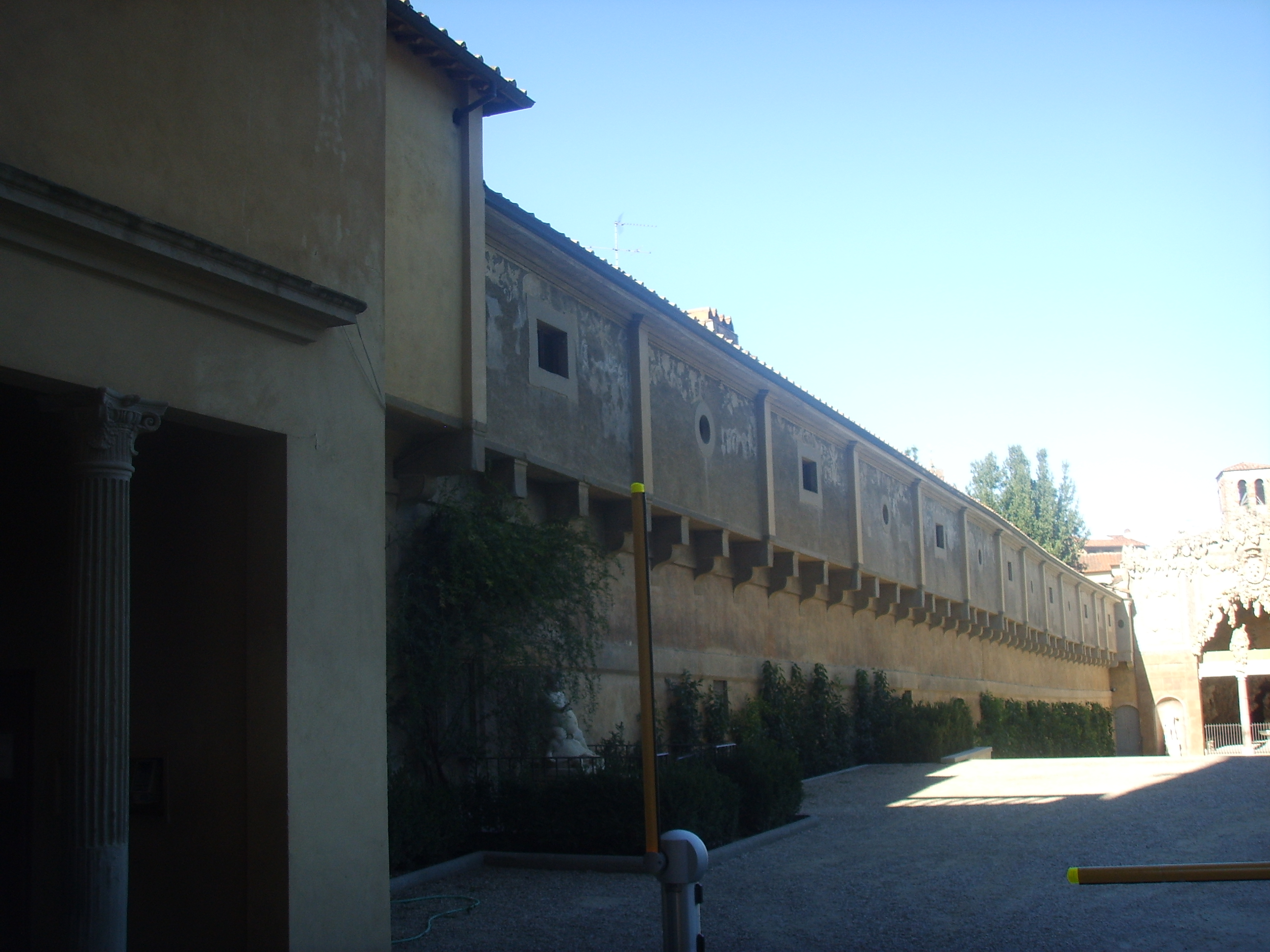 Vasari Corridor, corridoio vasariano in Florence, Italy